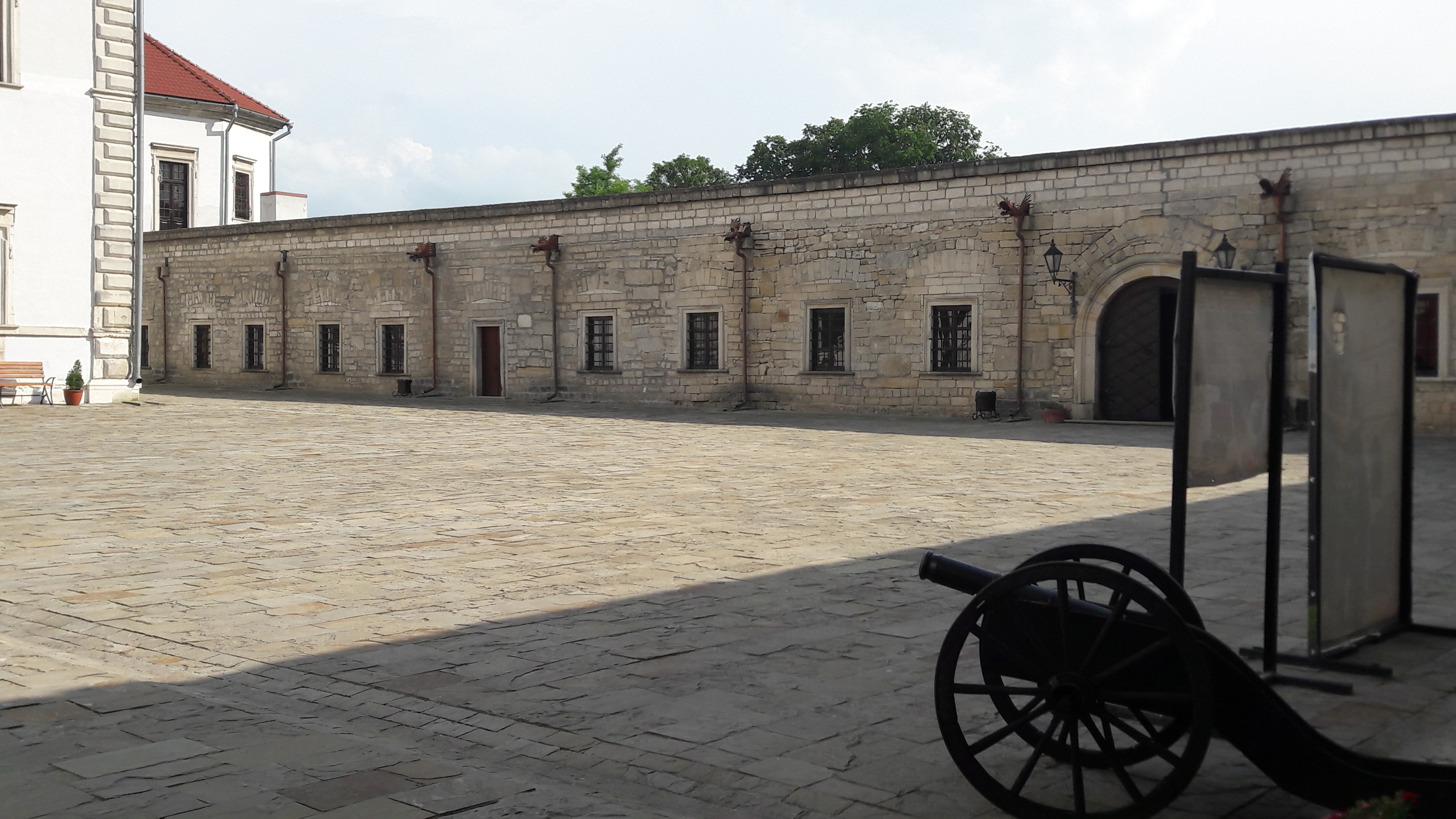 Zbaražo pilis Ukrainoje